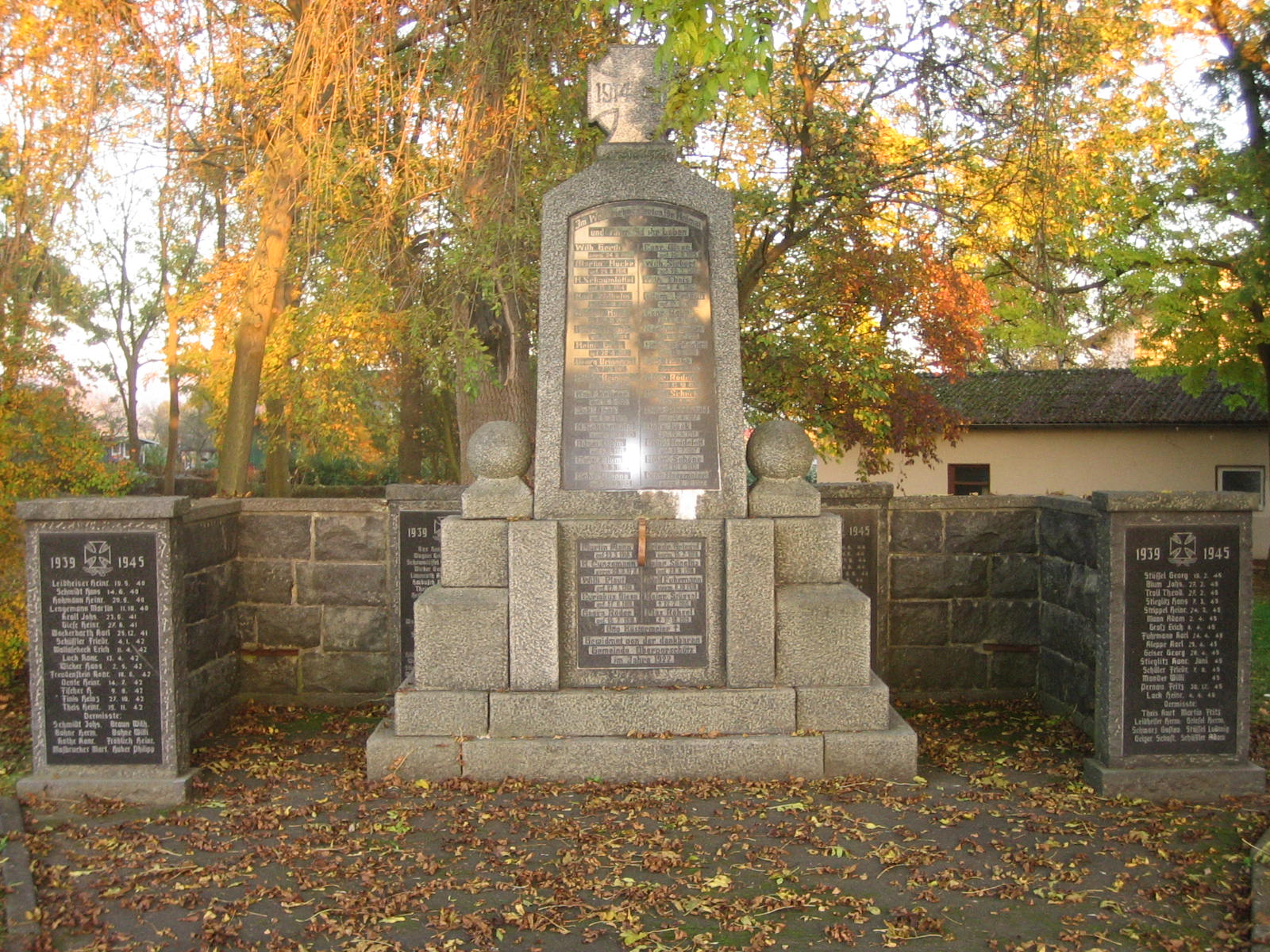 Ehrenmal in Obervorschütz für die Gefallenen der beiden Weltkriege